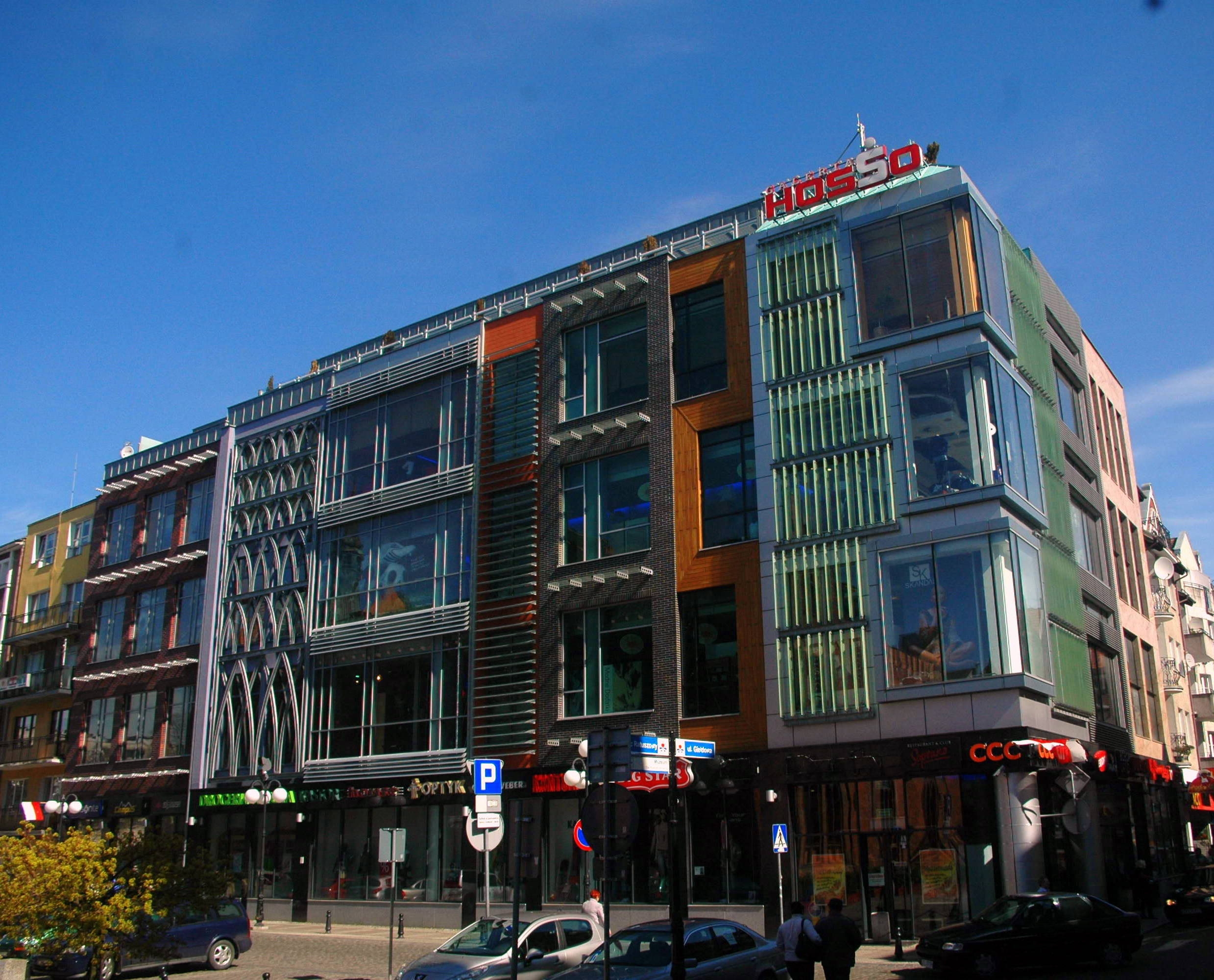 Galeria Hosso w Kołobrzegu.